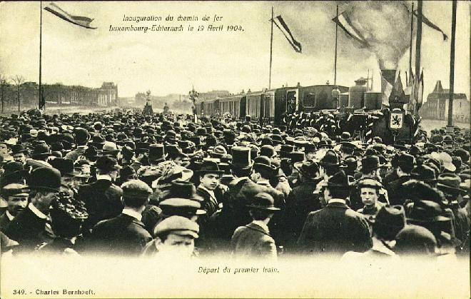 Luxembourg. Inauguration du chemin de fer Luxembourg - Echternach le 19 avril 1904.